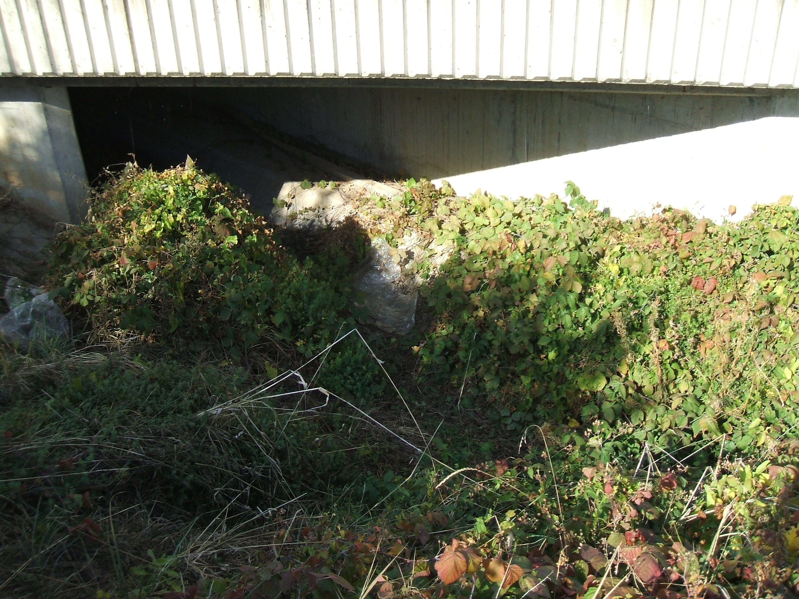 Auslass des weiten Durchlasses des Riedgrabens unter der B 3. Das Grabenprofil weist rechts und links Schultern auf, die stets trocken sein sollen, um Tieren bis etwa Rehgröße den Sperrriegel der neu gebauten Ortsumfahrungsstraße etwas durchlässig zu machen. Im trockenen Schlamm des Grabens sind Trittspuren erkennbar, der Boden des trockenen Riedgrabens ober- und unterhalb des Durchlasses zeigt von Tieren angelegte und genutzte Pfade. (Ähnlich gestaltet ist ein Durchlass an dem gleichzeitig gebauten Anschluss der B 275.)